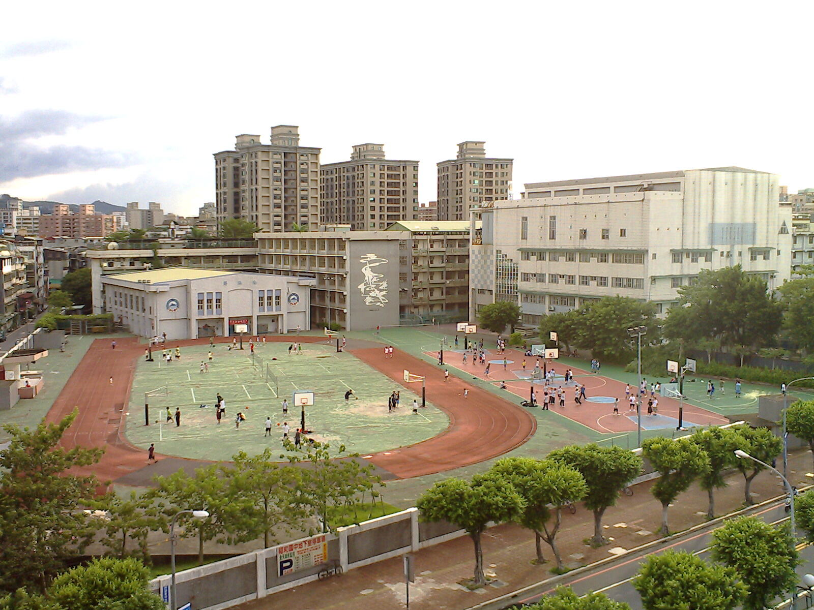 臺北縣立福和國民中學操場。